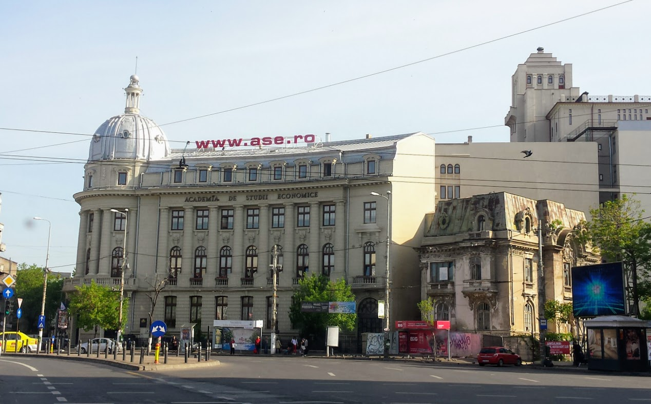 Academia de Studii Economice, Piața Romană, București.